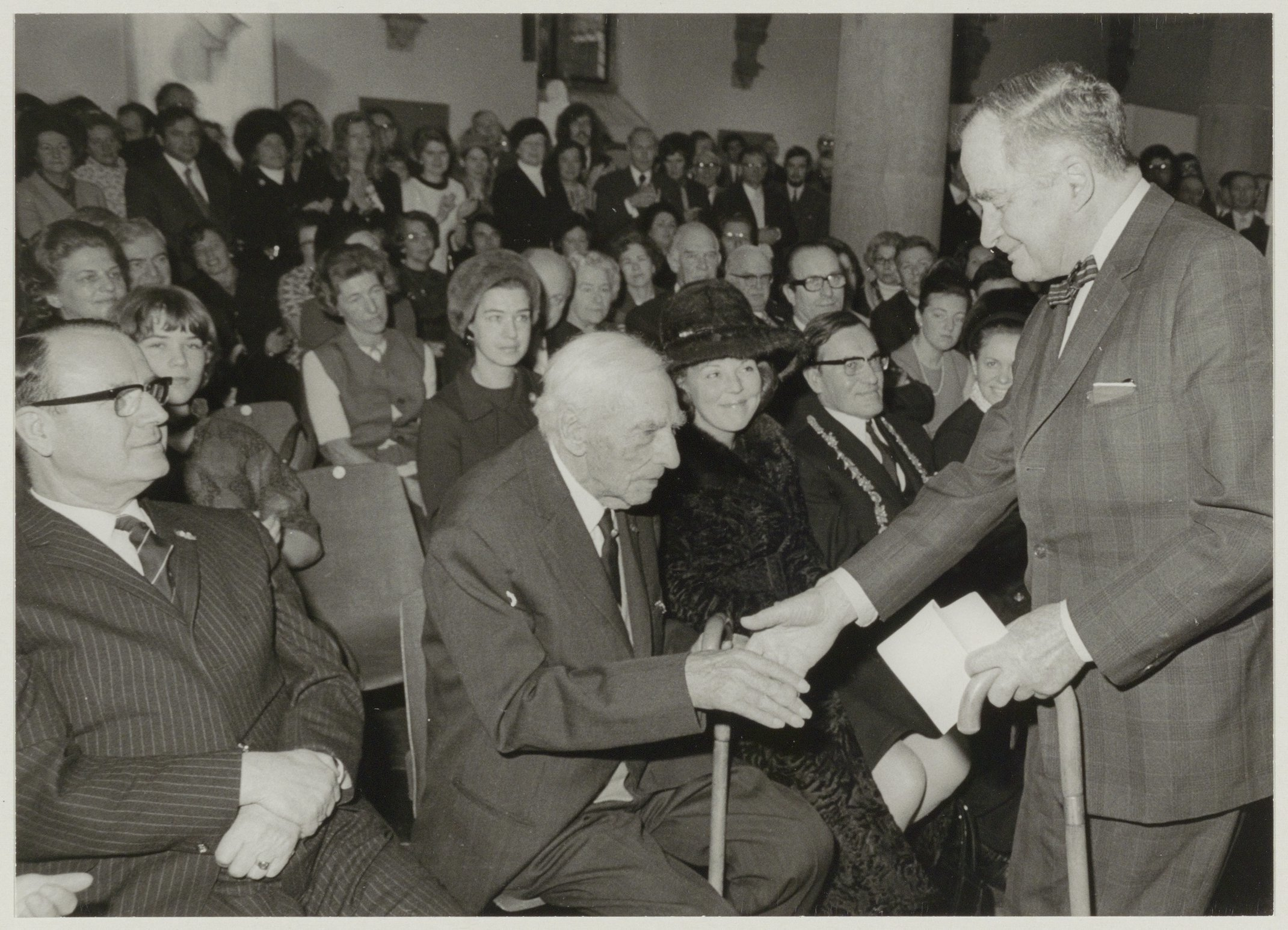 CollectieCollectie Fotoburo de BoerInventarisnummerNL-HlmNHA_54011896NL-HlmNHA_1478_10218KBeschrijvingDe dichter Roland Holst feliciteert Jan Bronner met zijn negentigste verjaardag. V.l.n.r. Commissaris v.d. Koningin de heer Kranenburg; Jan Bronner; H.K.H.Prinses Beatrix, Burgemeester de Gou.FotonummerNL-HlmNHA_1478_2767DocumenttypeHistorieprenten, tekeningen en foto'sVervaardigerBoer, Cees de (1918-1985) Soort vervaardigerFotograaf Interieur/ExterieurInterieurPersonenOranje-Nassau, Beatrix Wilhelmina ArmgardBronner, Jan (1881-1972)Kranenburg, commissaris v.d.KoninginRoland Holst, AGou, Burgemeester de LandNederland ProvincieNoord-Holland GemeenteHaarlem PlaatsHaarlem StraatGrote Markt GeografischCentrum Begindatum24-12-1971Einddatum24-12-1971Datering gebeurtenis24-12-1971TechniekFoto TrefwoordenPersonen, Beeldende Kunsten